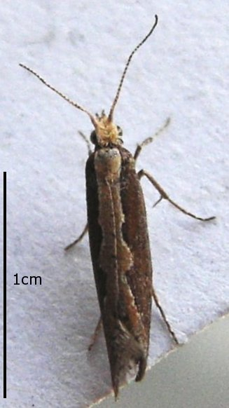 Plutella xylostella (syn.: Plutella maculipennis) from Cologne, Germany.